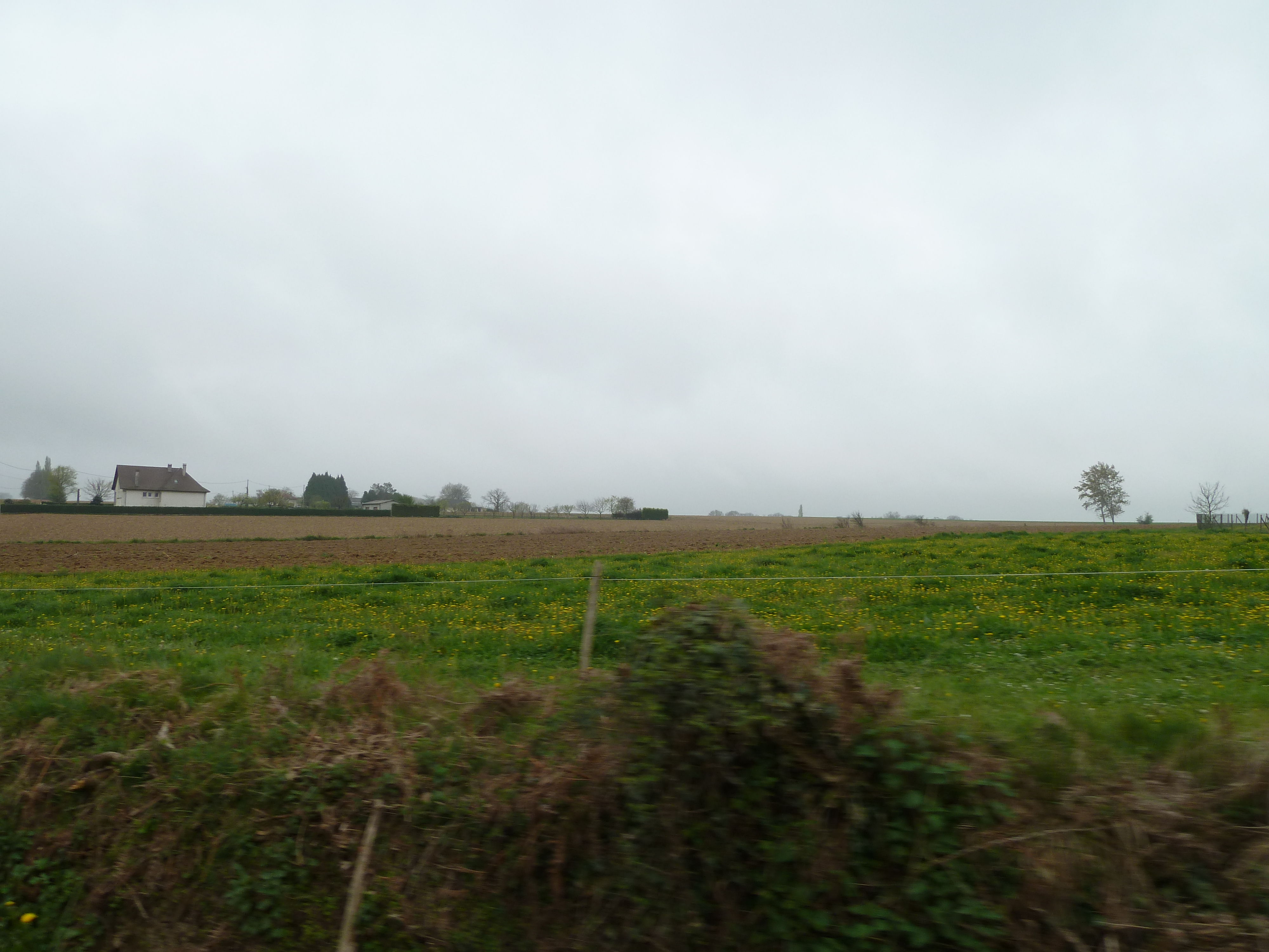 Séron